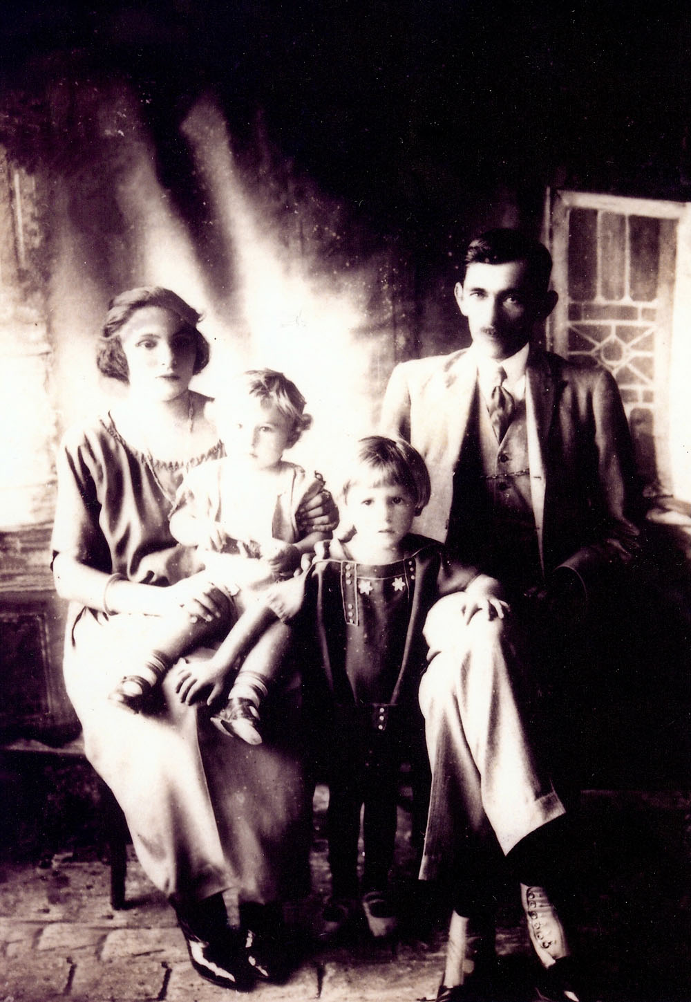 foto que mostra o Cardeal Eugênio de Araujo Sales, ainda criança, ao lado dos pais e do irmão Sílvio